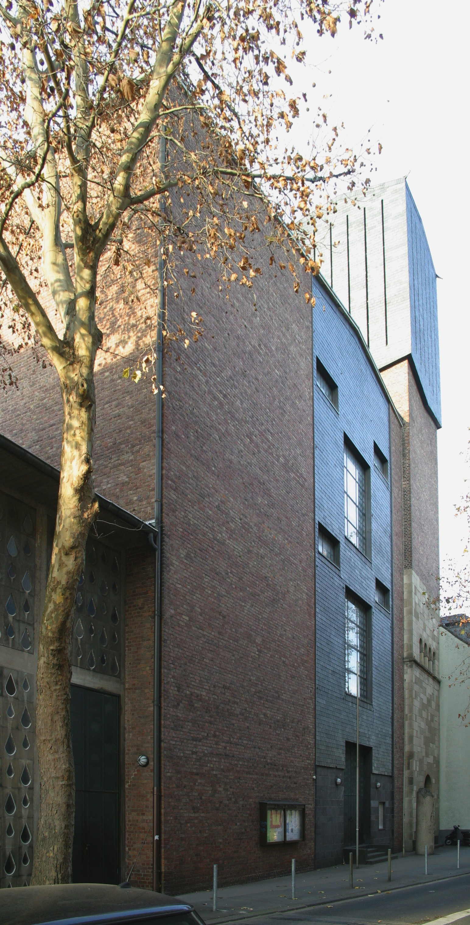 St. Mechtern Mechternstr. 4–8 in Köln Ehrenfeld. Vollansicht des Gebäudes (gehört nicht zum denkmalgeschützten Teil des Gebäudes) This is a photograph of an architectural monument.